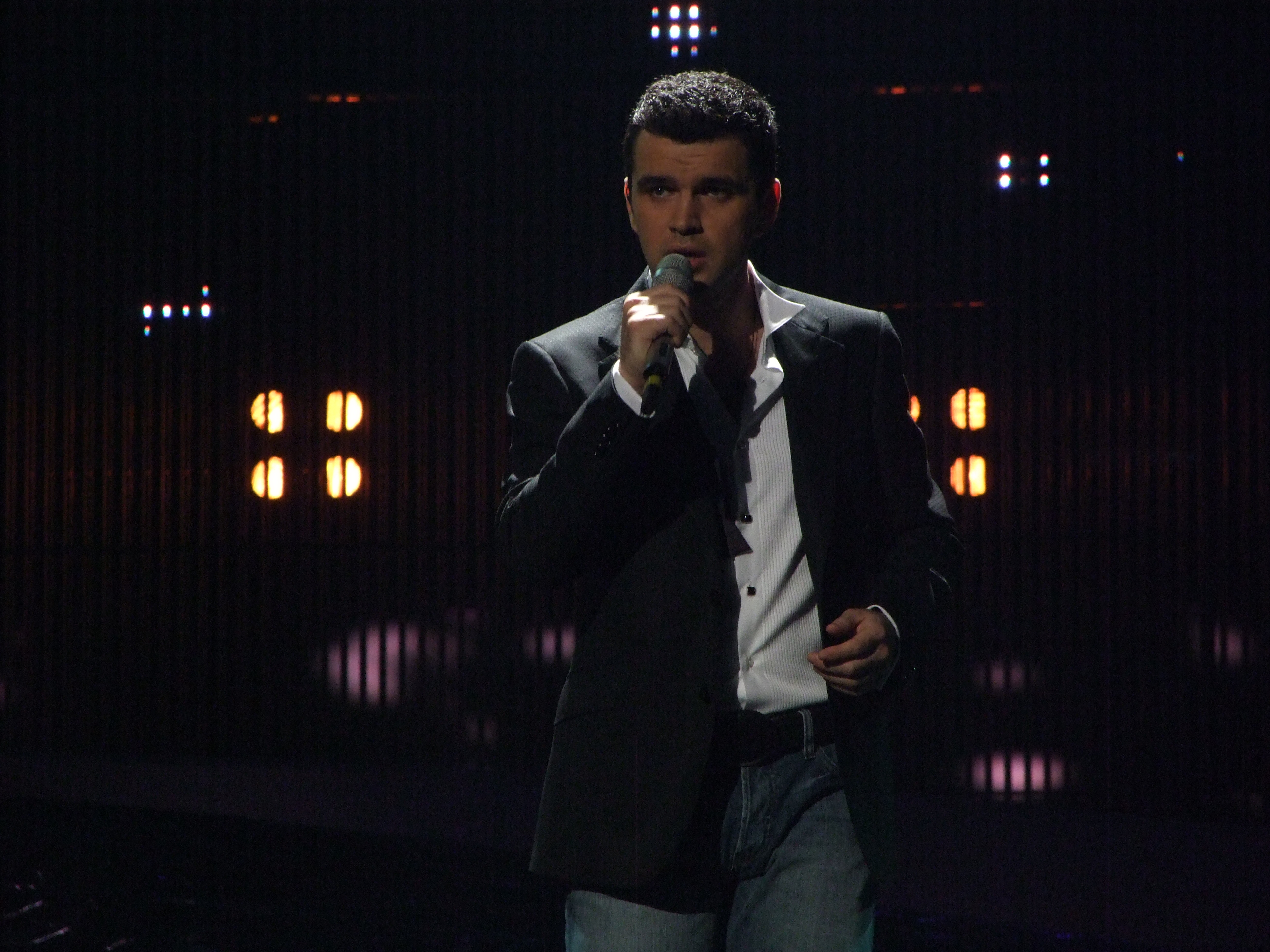 Semifinal 1 EUROVISION 2008